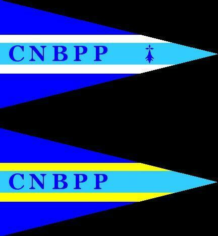 Pavillons du club nautique